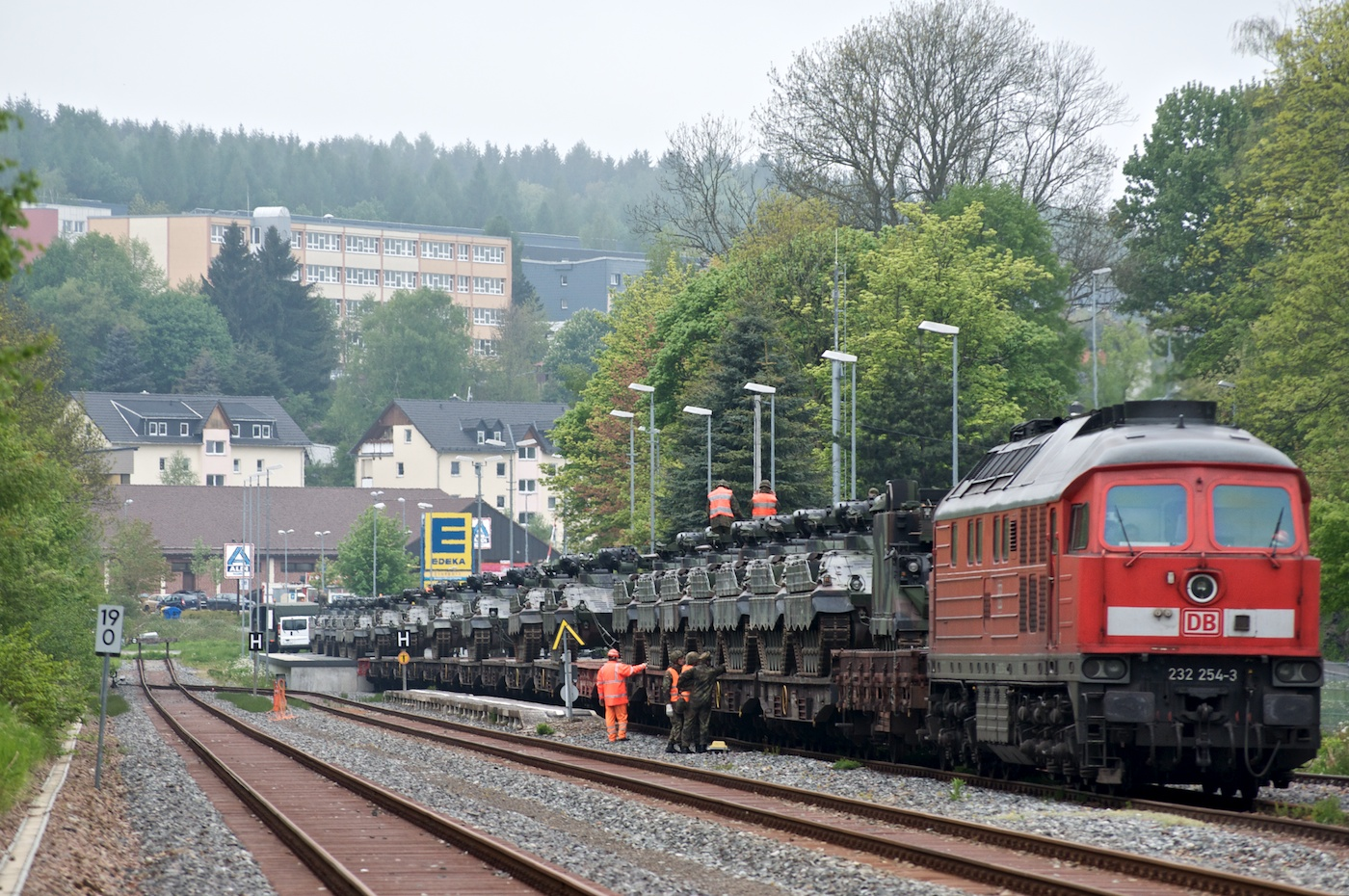 232 254 mit Militärzug in Marienberg